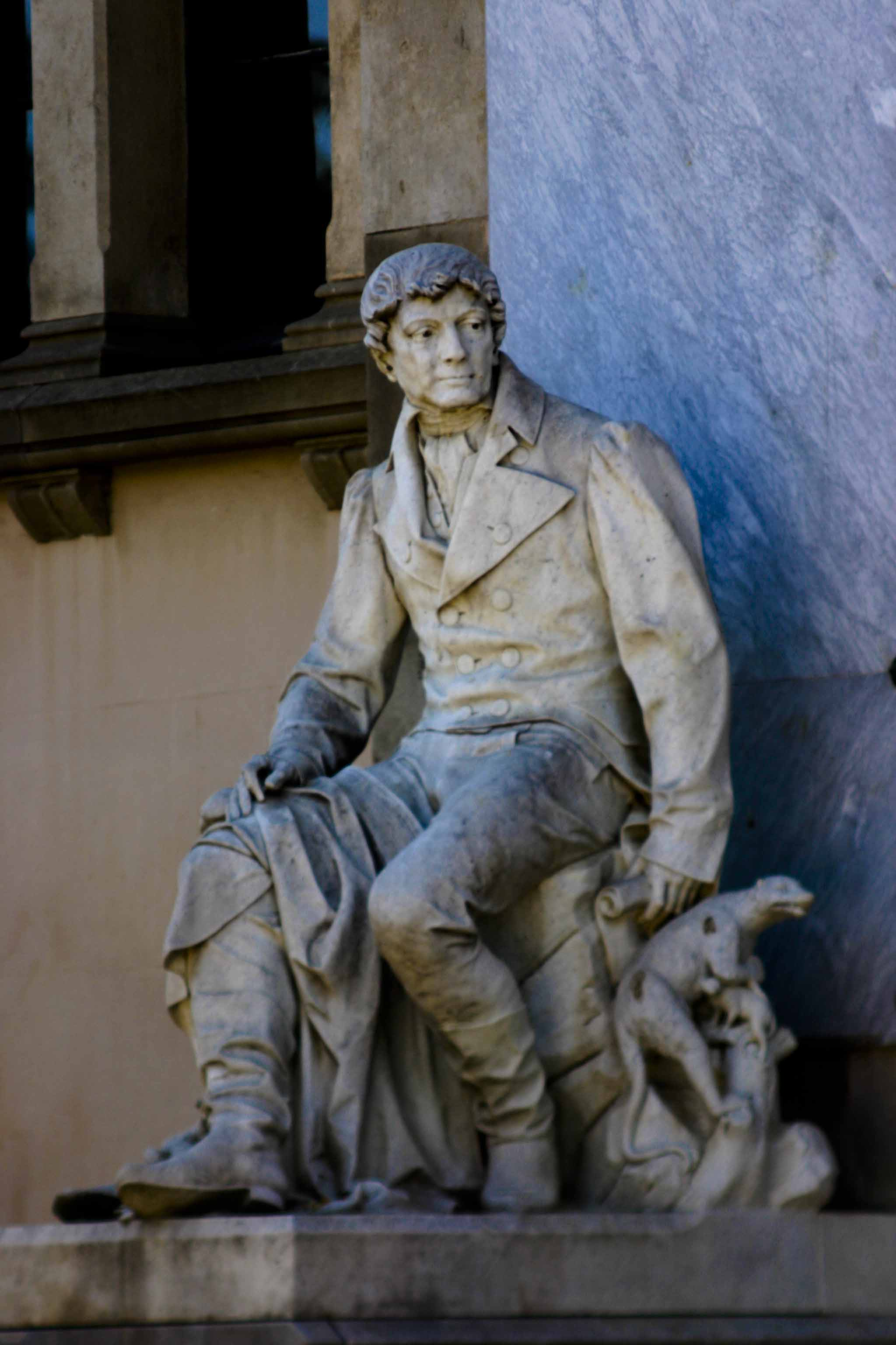 Estatua de Felix de Azara, Museu Martorell, Barcelona, Spain